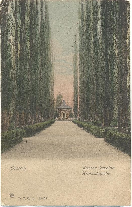 Az orsovai Korona kápolna. A Szent-Korona Orsovánál volt 1849-től 1853-ig elrejtve. Az elásás helyén, a Szent-Korona ittlétének emlékére 1855-ben „Koronakápolnát” építettek. A kápolna azonban a Duna vize alá került. Az 1976-ban átadott orsovai Római Katolikus templomban, melyet Hans Hackelman tervezett modern stílusban, s benne német, magyar, román és cseh nyelven tartanak miséket, 2004 májusában a Szent Korona Szövetség három nyelven emléktáblát állított fel, mely felidézi a Szent Korona Orsovához fűződő történetét.